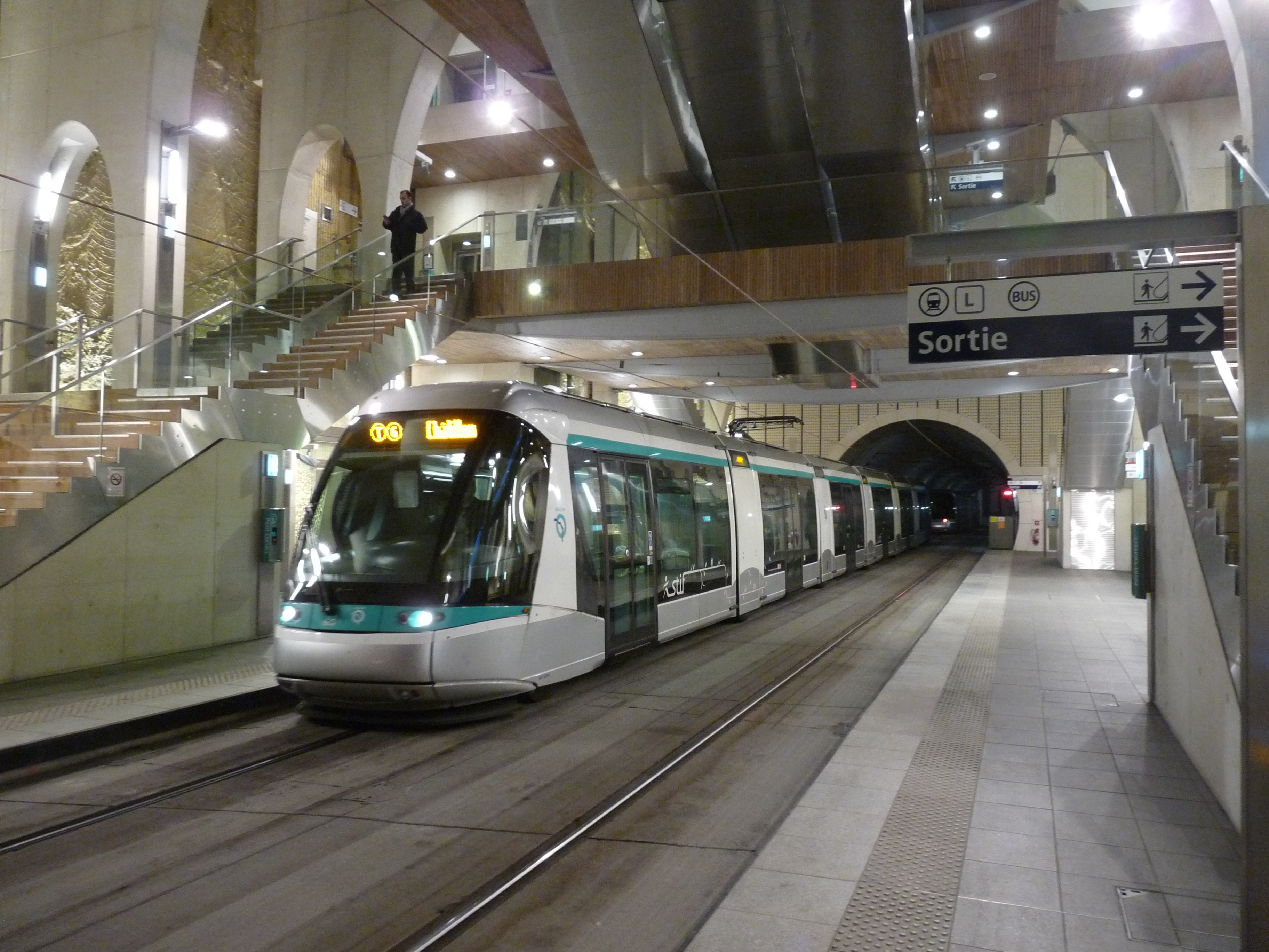 Ondergrondse tramstation van Viroflay-Rive-Droite